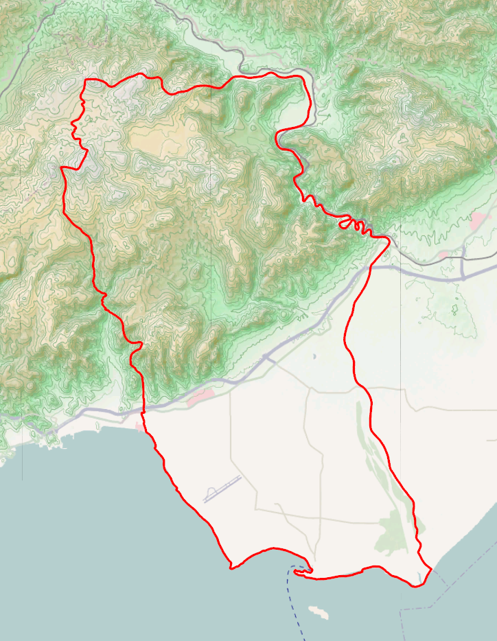 Τοπογραφικός χάρτης του Δήμου Νέστου.